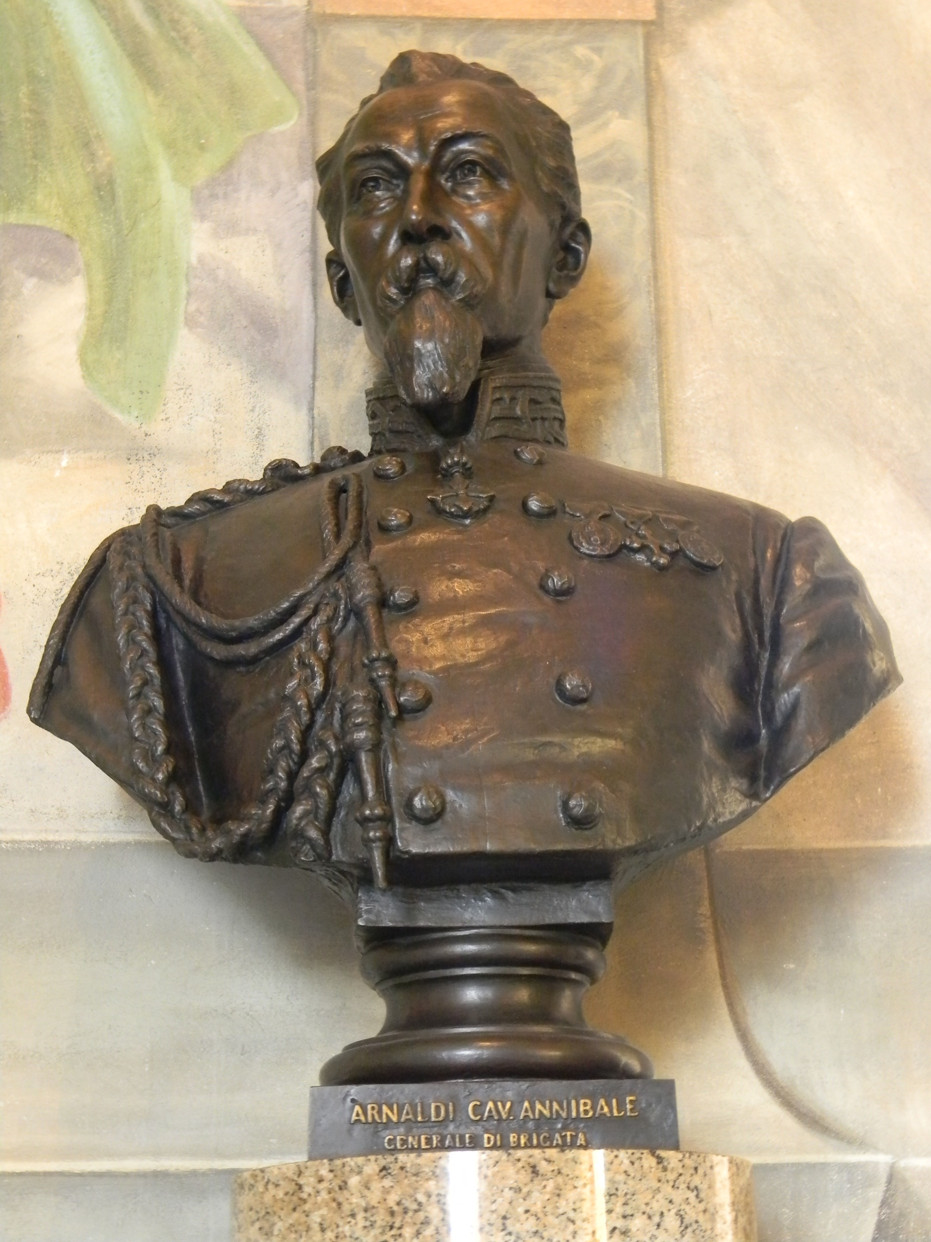 Annibale Arnaldi, buste depuis la tour de San Martino, Italie